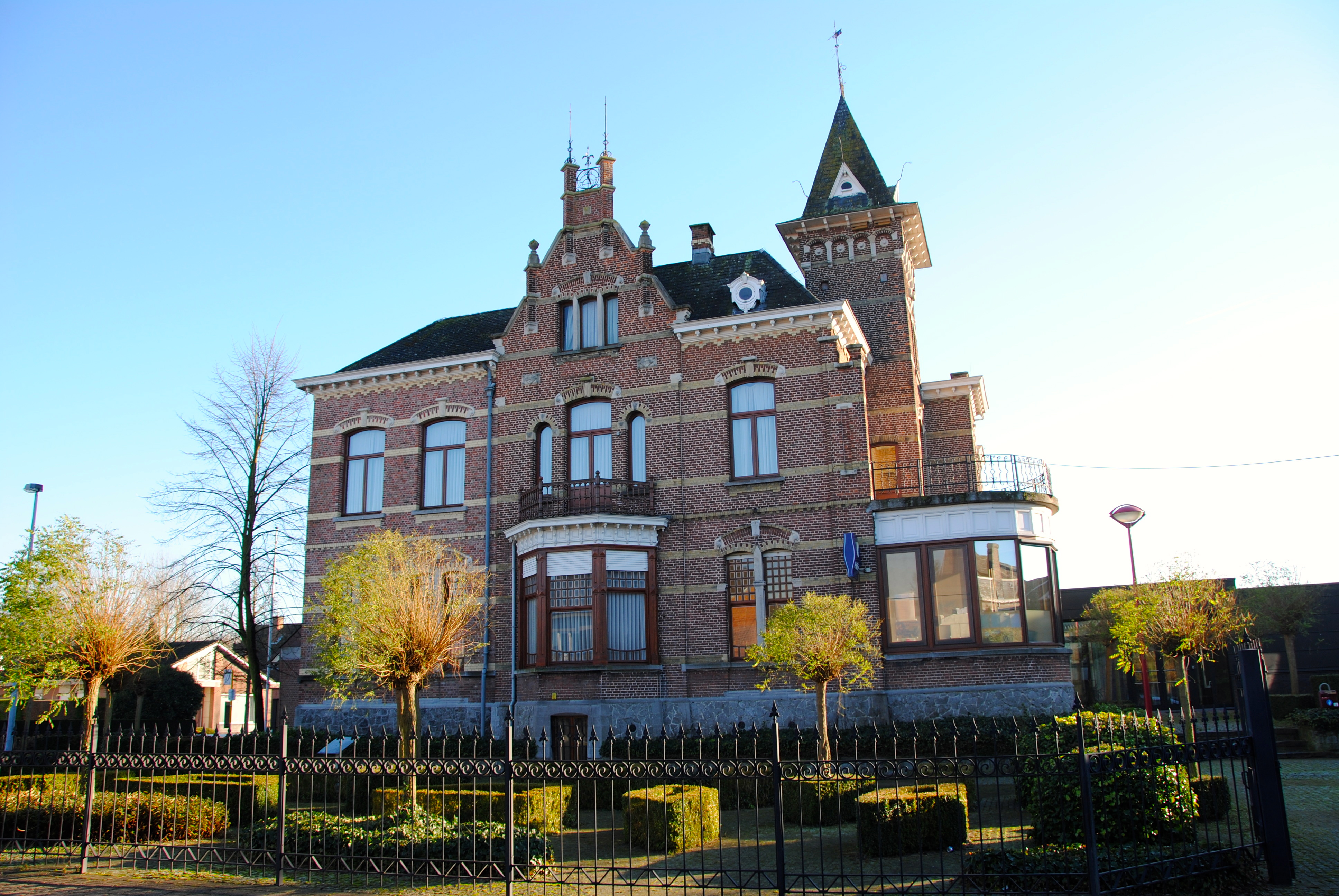 Voormalige villa Van Stappen, sinds 1939 gemeentehuis van Sint-Amands